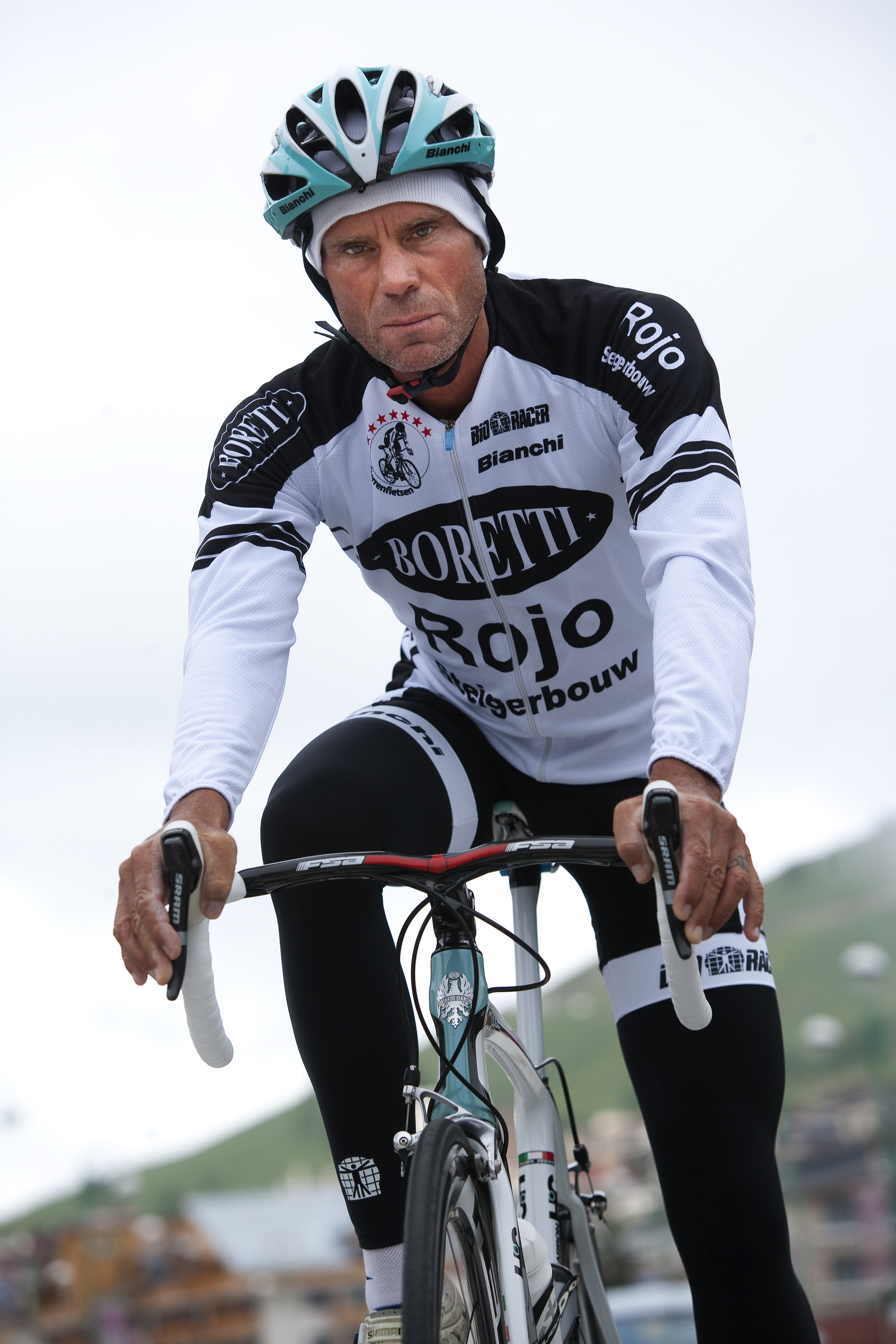 LE BOURG D'OISANS - Gert-Jan Theunisse, namens het Sterrenfietsteam deelnemer aan de Alpe d'HuZes